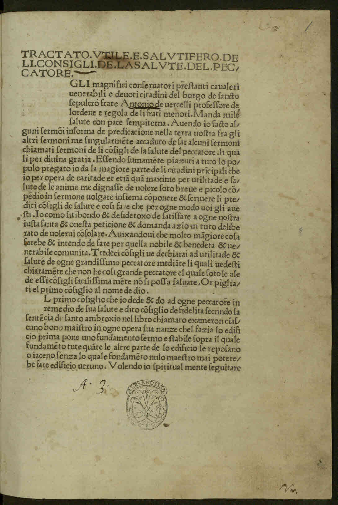 Consegli della salute del peccatore. - [S. l.] : [Tipografo del Sallustius], MCCCCLXX. - 54 c. ; 4º.